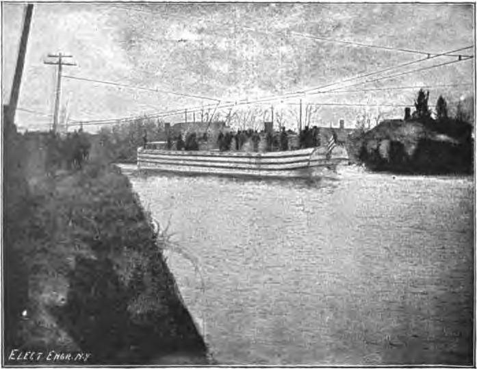 Versuch mit einem Oberleitungsboot, das nach Frank W. Haley benannt wrude, auf dem Erie-Kanal, 1893